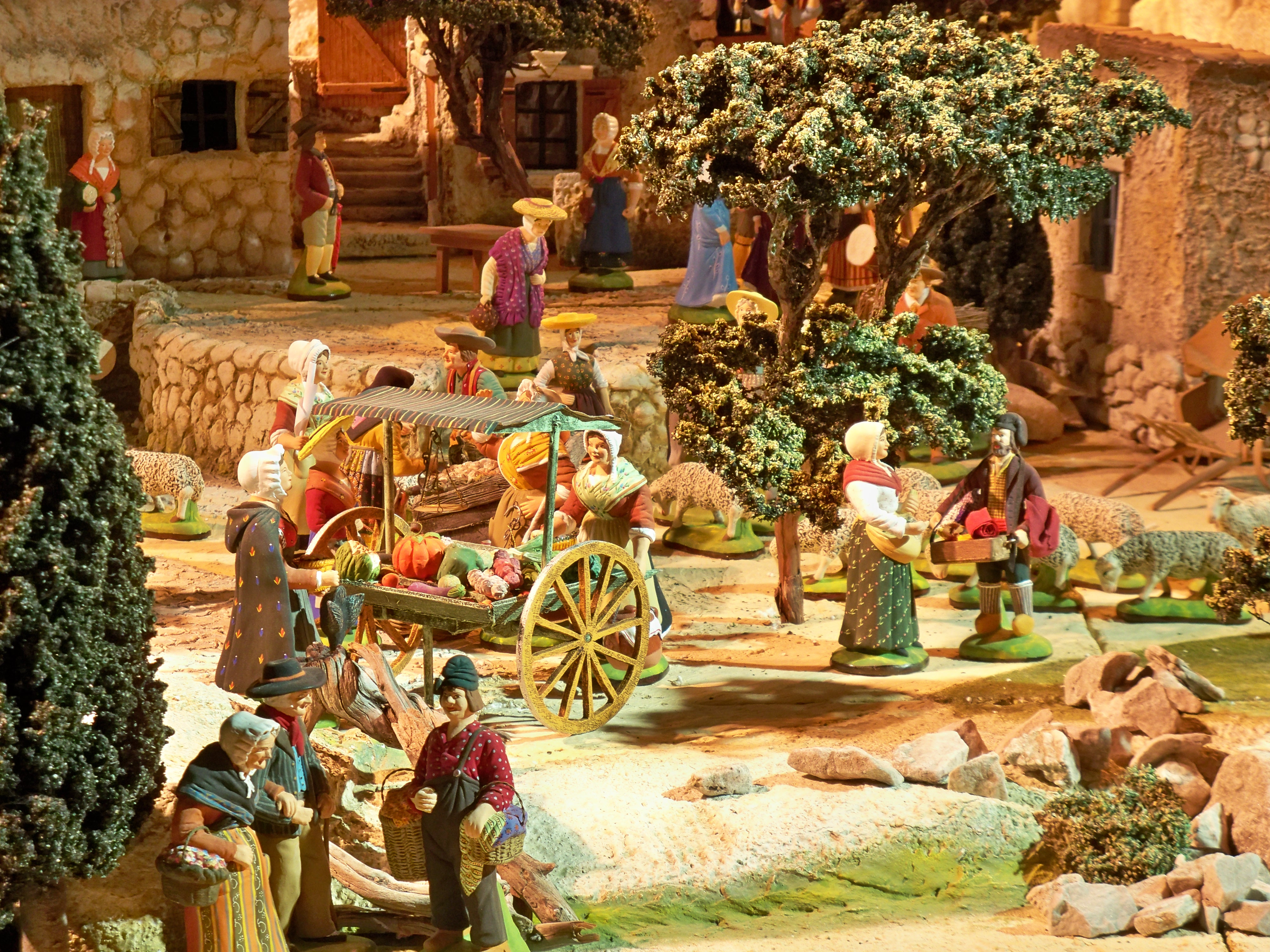 détail de la crèche de l'hotel de ville d'Avignon, Vacluse, France, exécuté par les Ateliers Marcel Carbonel.